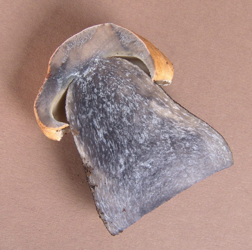 Querschnitt einer Heiderotkappe. Schön ist das schwärzende Fleisch zu erkennen